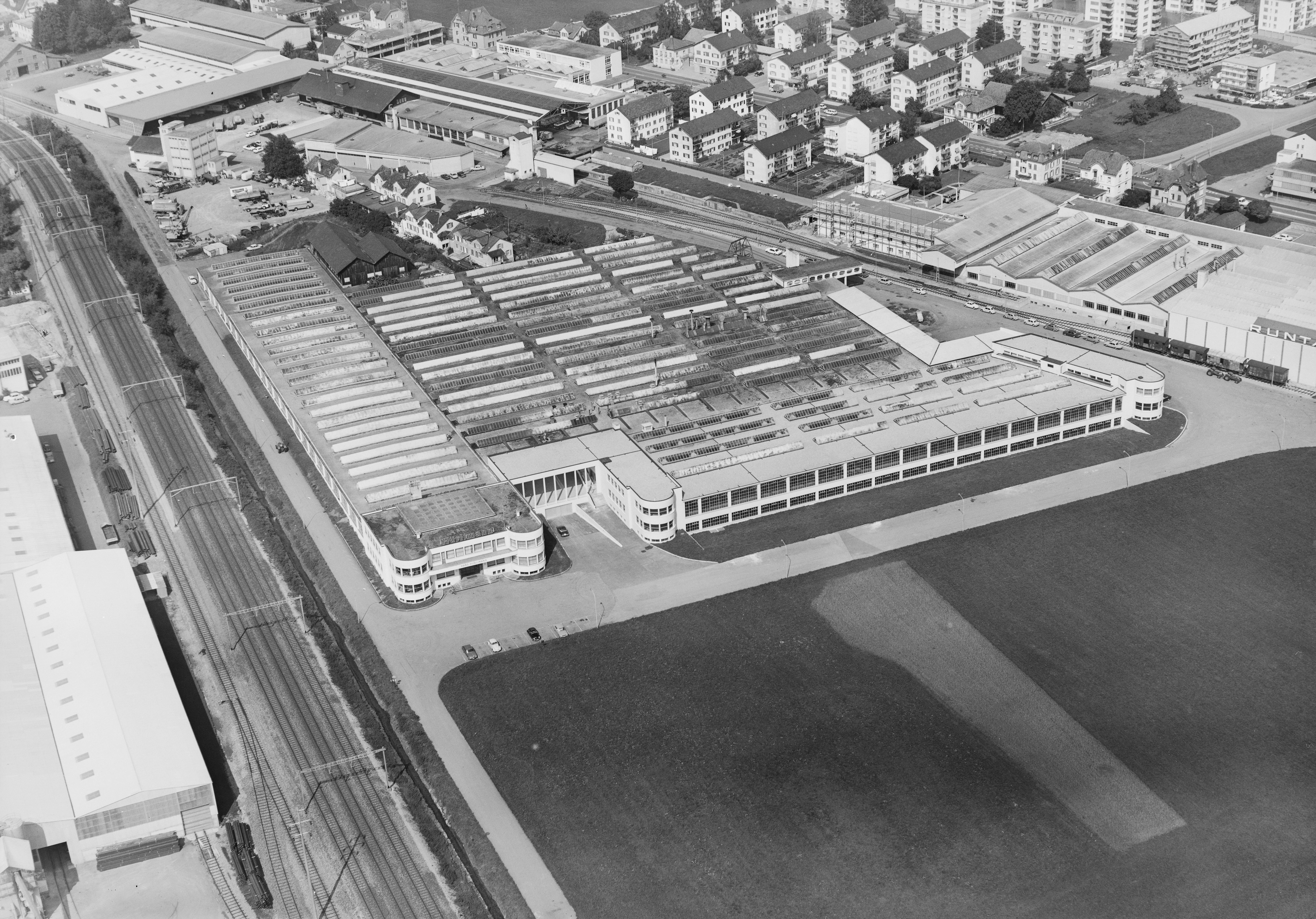 in Bildmitte die Hürlimann Traktoren AG, links die SBB-Bahnlinien Richtung St.Gallen und Toggenburg, rechts die Firma Runtal-Werk AG (Produktion von Heizkörpern und Wärmetauschern etc.), am oberen Bildrand die Firmen AGRAR und Lagerhaus AG Wil